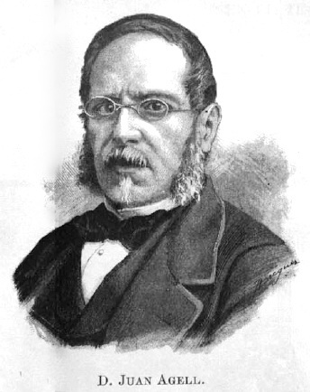 Joan Agell i Torrents (Sanaüja, Segarra, 1809 - Barcelona, 1868) fou un científic català.